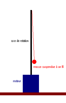 Pendule conique : schéma du dispositif (Schéma personnel) Catégorie:schéma_de_physique